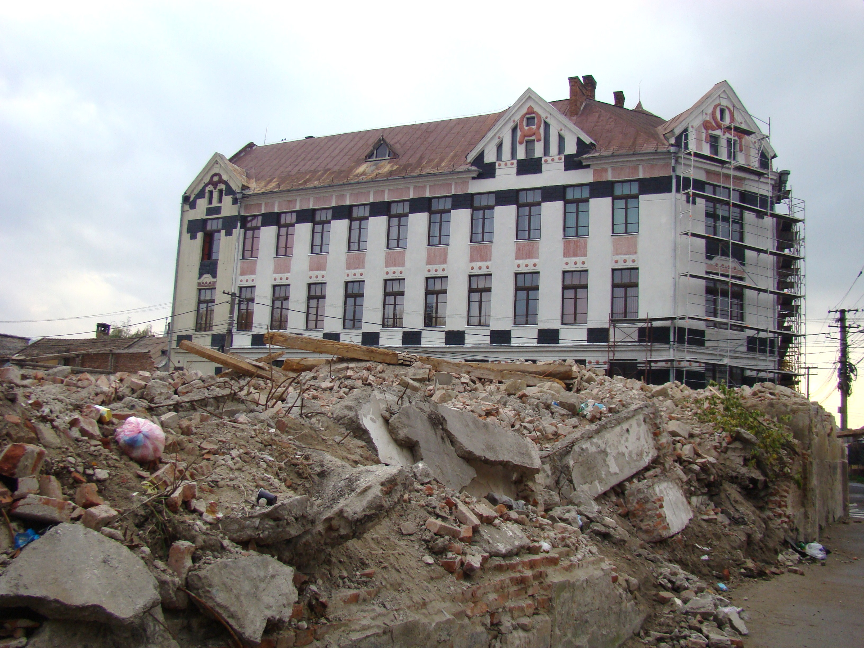 Liceul "Dragoș Vodă", municipiul Sighetu Marmației, Str. Mihai Viteazul 14